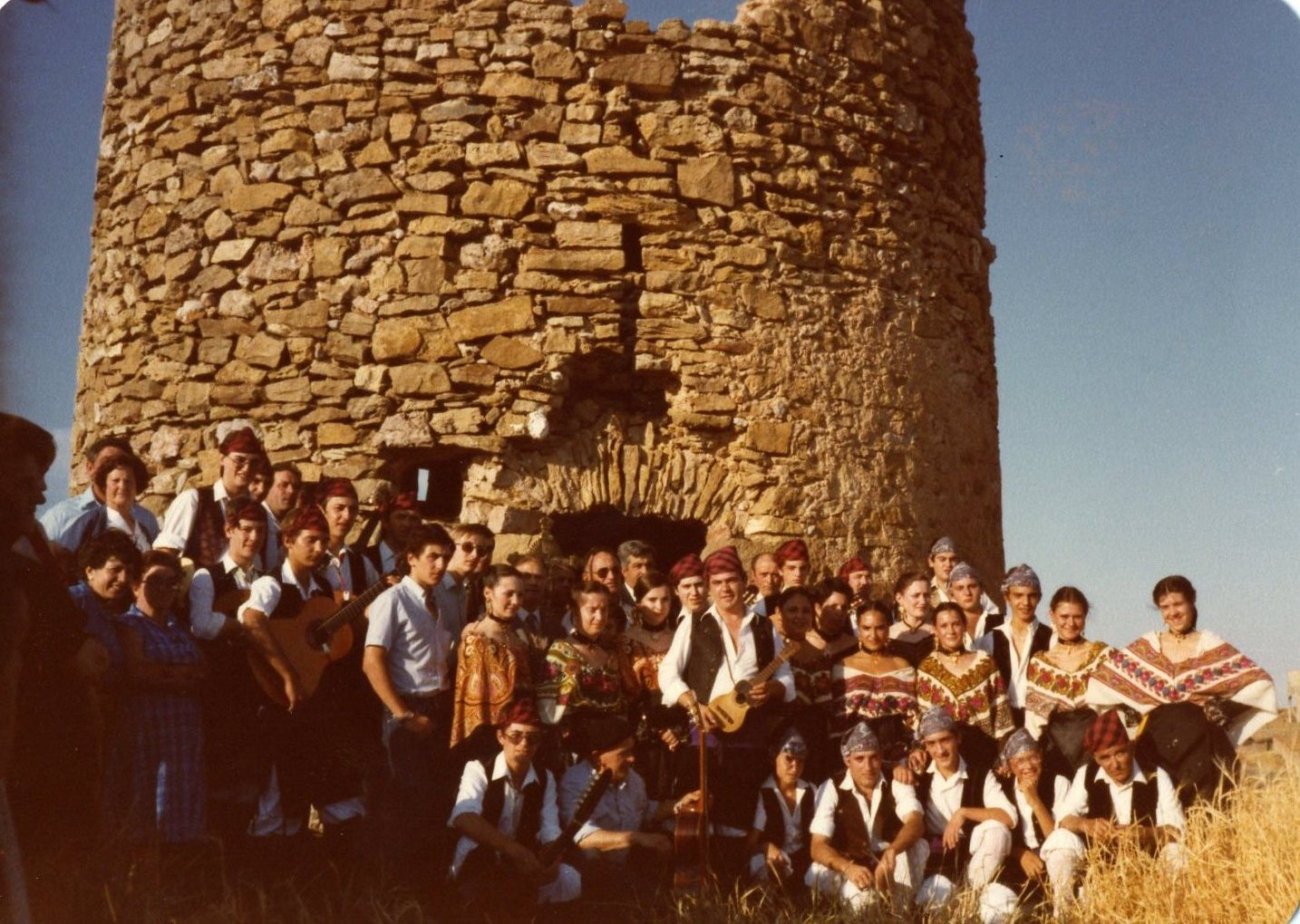 Colocación de la primera piedra de la rehabilitación del molino de viento de Malanquilla en 1981